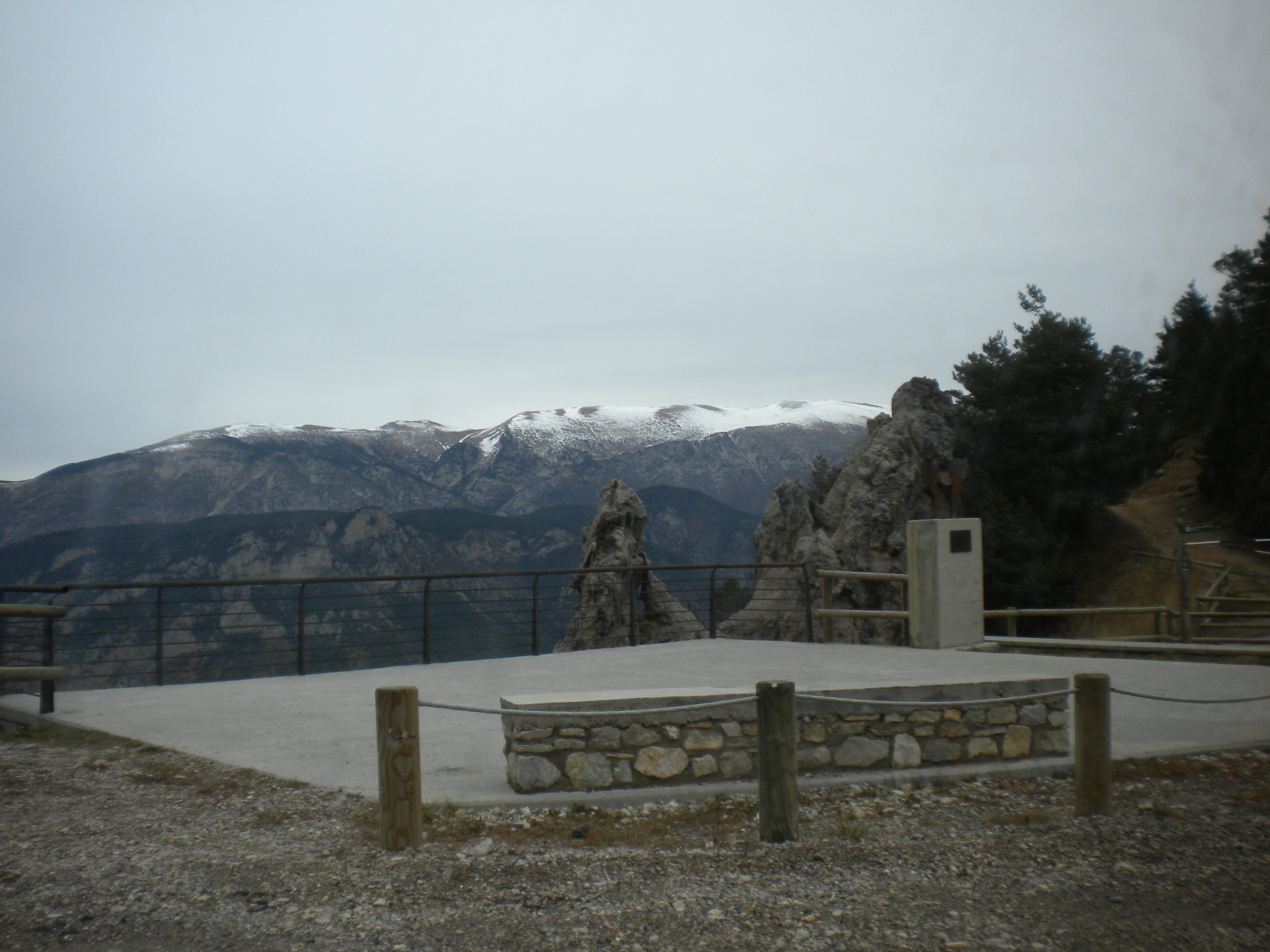 El Coll de Port, al fons el Cadinell i la Serralada del Cadí. Terme municipal de Josa i Tuixent (Alt Urgell).